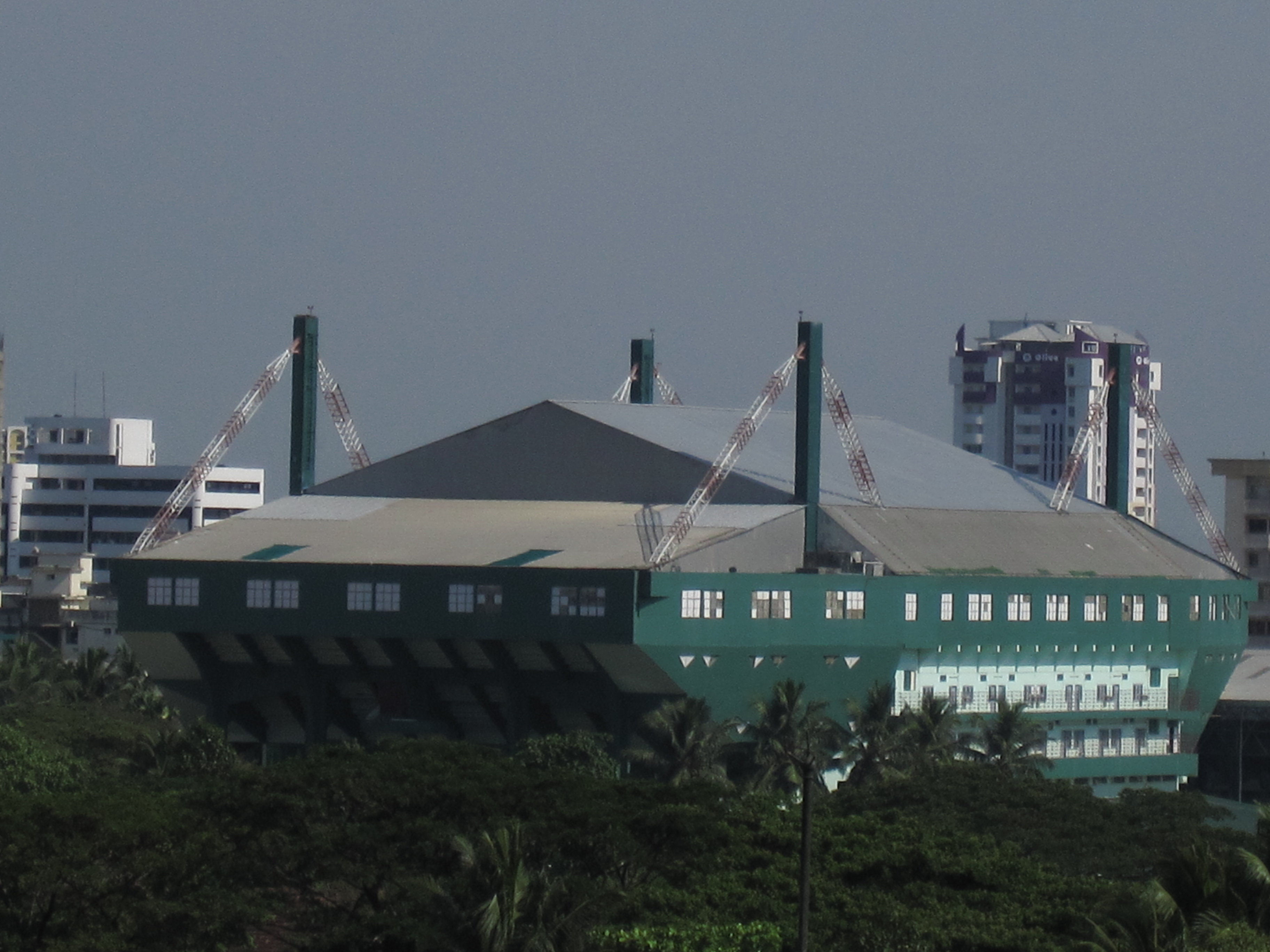 Kadavanthara Rajiv Gandhi Indoor Stadium, Ernakulam, Kerala